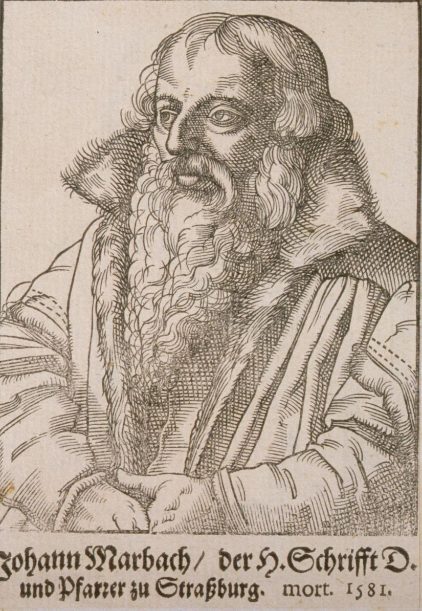 Porträt von Johannes Marbach, Präsident des Straßburger Kirchenkonvents in den Jahren 1553-158.1